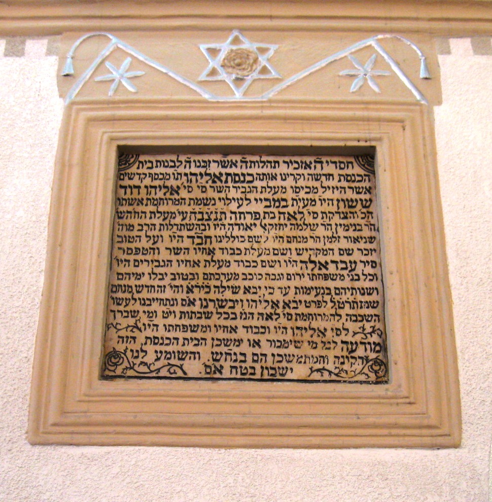 בית הכנסת צמח דוד רישיון נוצר על ידי משתמש:Daniel Ventura